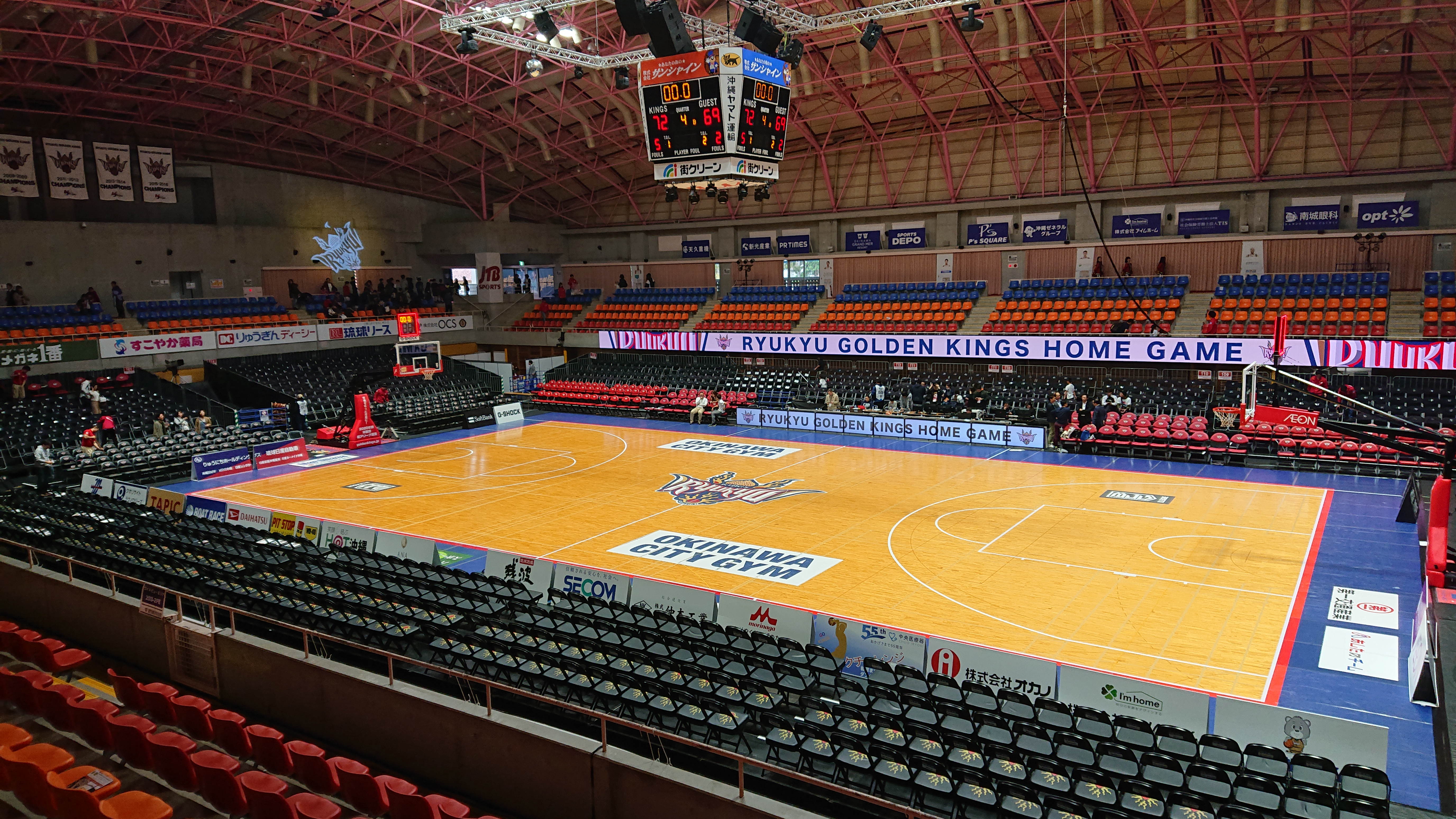 琉球ゴールデンキングスの試合フィールド